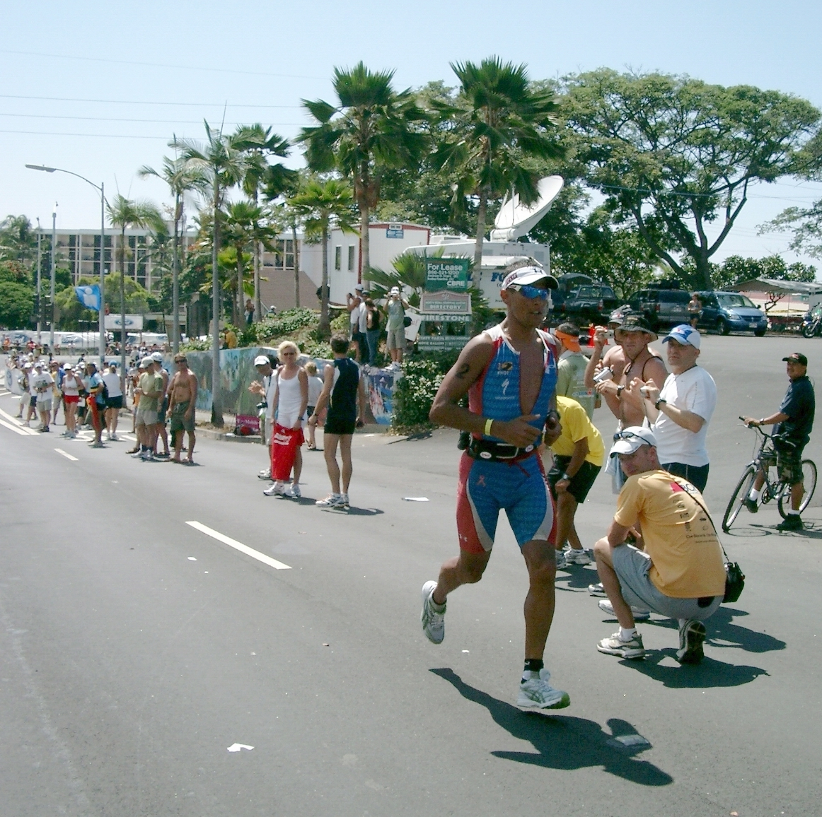 Ironman 2007 auf Hawaii, der Gewinner Chris McCormack beim Laufen